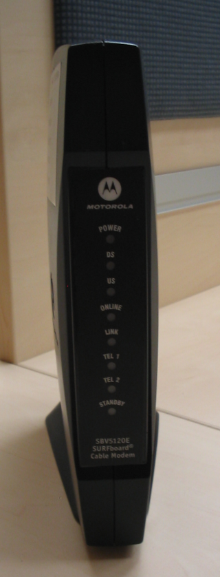 Modem kablowy VoIP stosowany w sieciach kablowych do przesyłania danych (zwykle do realizowania dostępu do Internetu), wraz z portami do podłączenia dwóch telefonów analogowcyh i realizacji usługi telefonicznej.